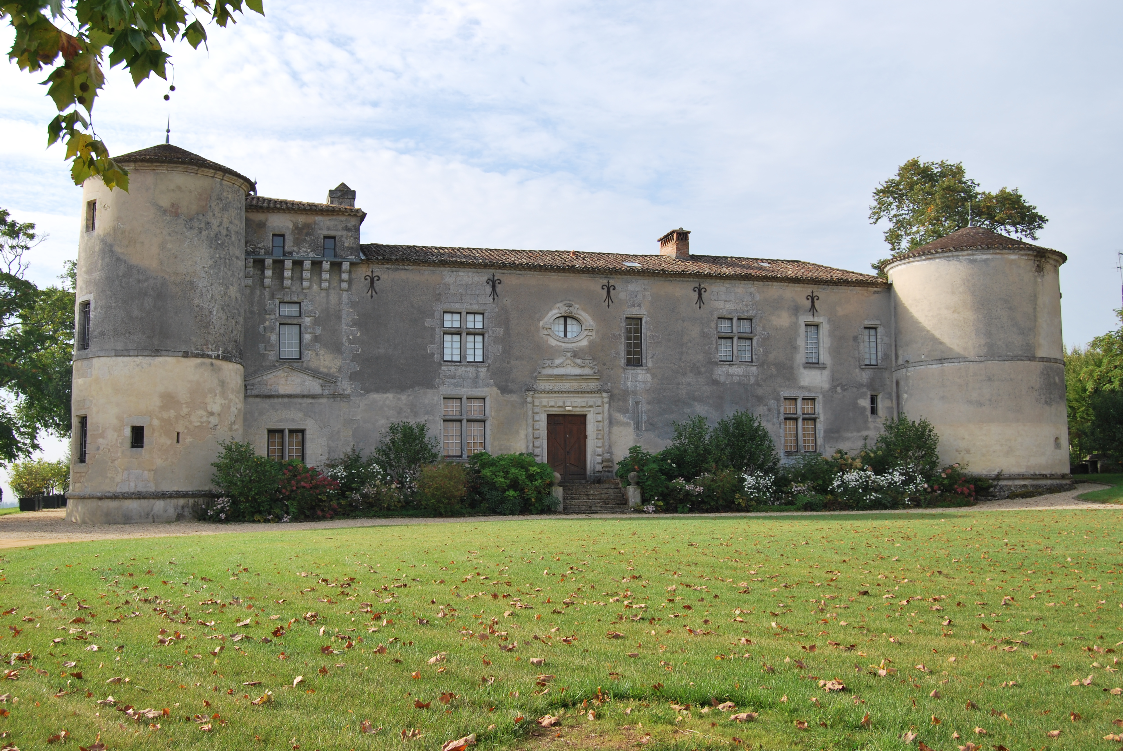 Château de Carles .